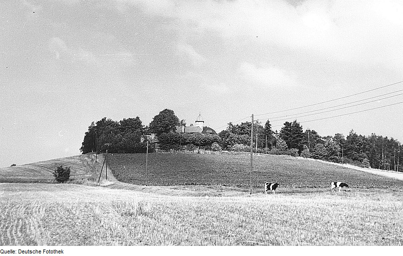 Original image description from the Deutsche Fotothek Ebersbach/Sachsen-Spreedorf. Felsenmühle, Blick zum Ausflugslokal